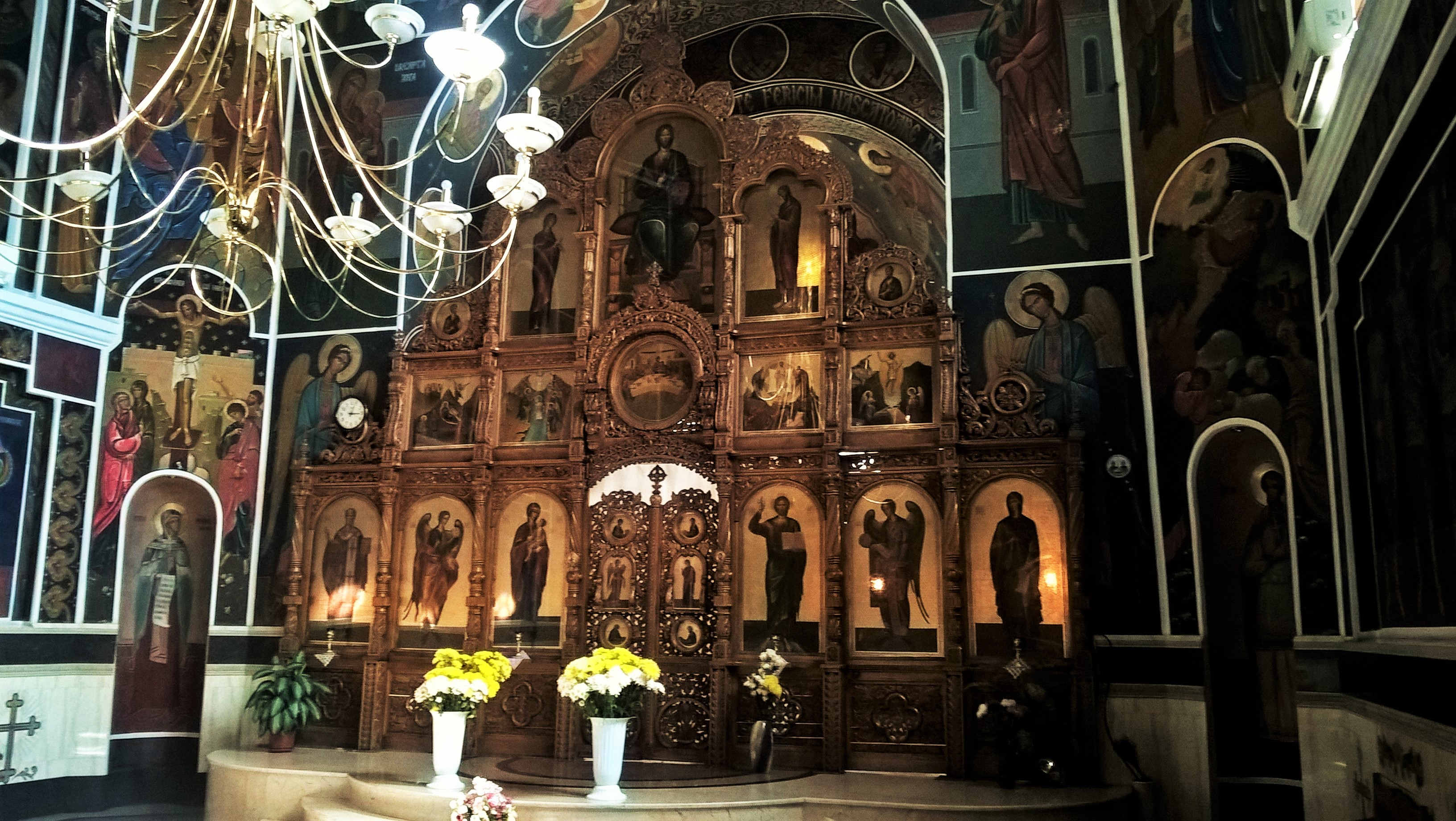 Cerkiew św. Teodory z Sihli w Kiszyniowie, wnętrze